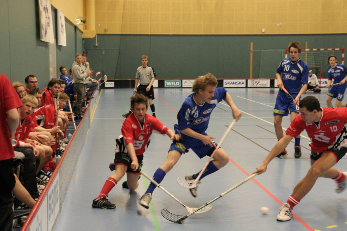 Floorball match in Växjö between Växjö Vipers and UHC Weißenfels